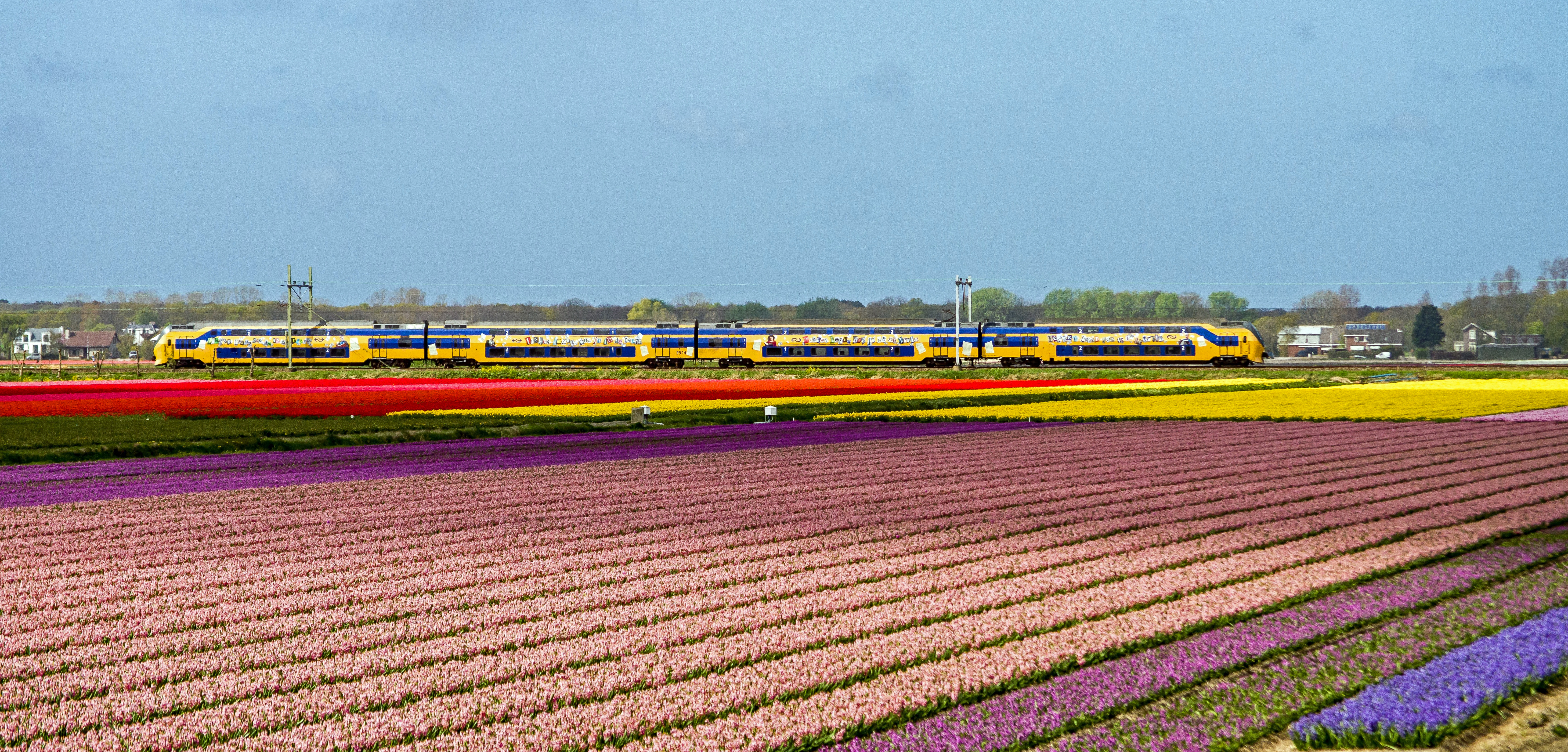 Door de bloembollenvelden bij Hillegom rijdt IRM 9514 (lekker lezen) naar Amsterdam Centraal.